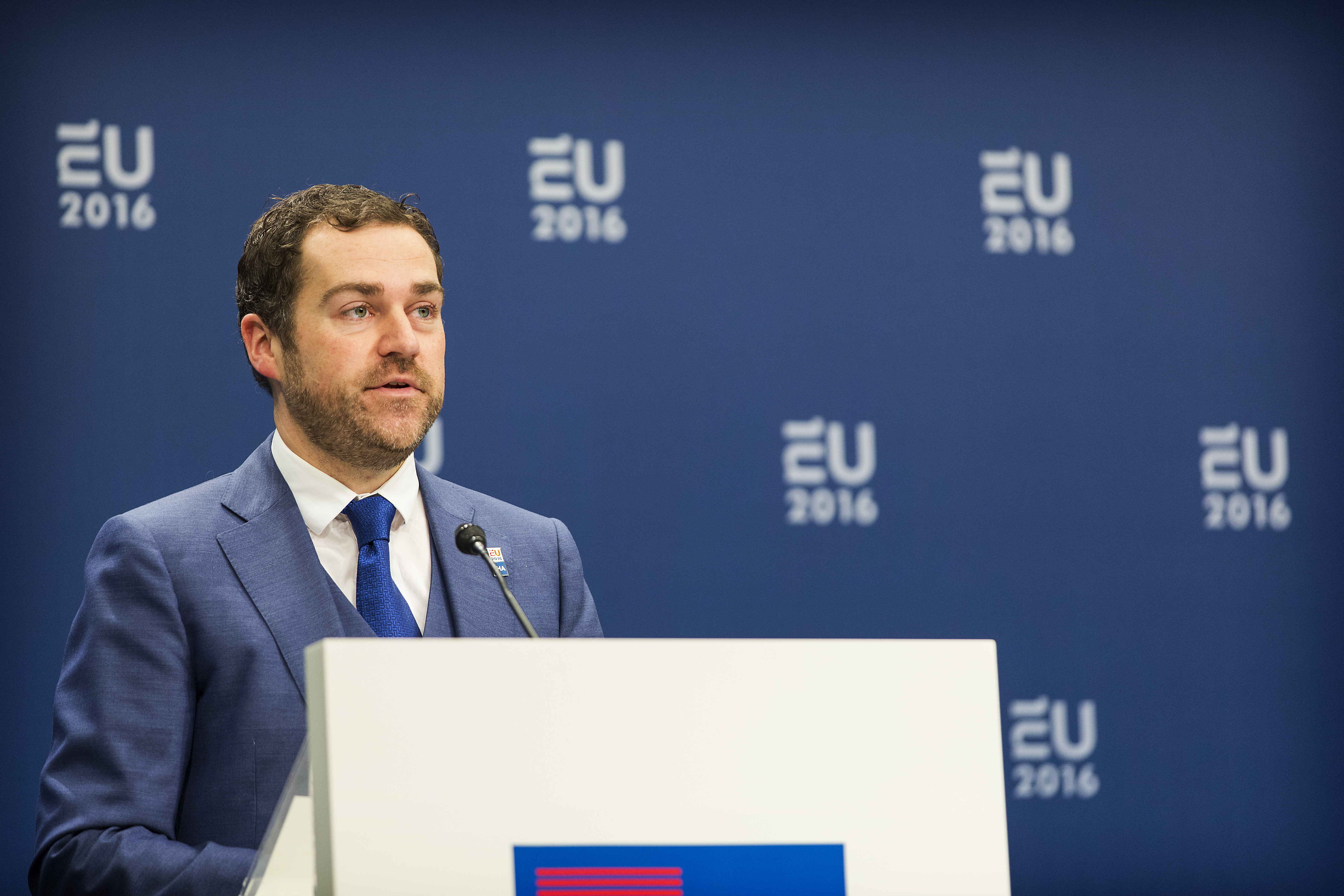 Amsterdam, 25 januari 2016 / Amsterdam 25th of January 2016. Persconferentie van minister van Justitie en Veiligheid Art van der Steur, Europese Commissaris Dimitri Avramopoulos en staatssecretaris Klaas Dijkhoff van Immigratie. Press conference with Dutch minister of Justice Art van der Steur, European Commissioner Dimitri Avramopoulos minister of Immigration Klaas Dijkhoff. Foto: Rijksoverheid/Valerie Kuypers – Photograph: Dutch Government/Valerie Kuypers